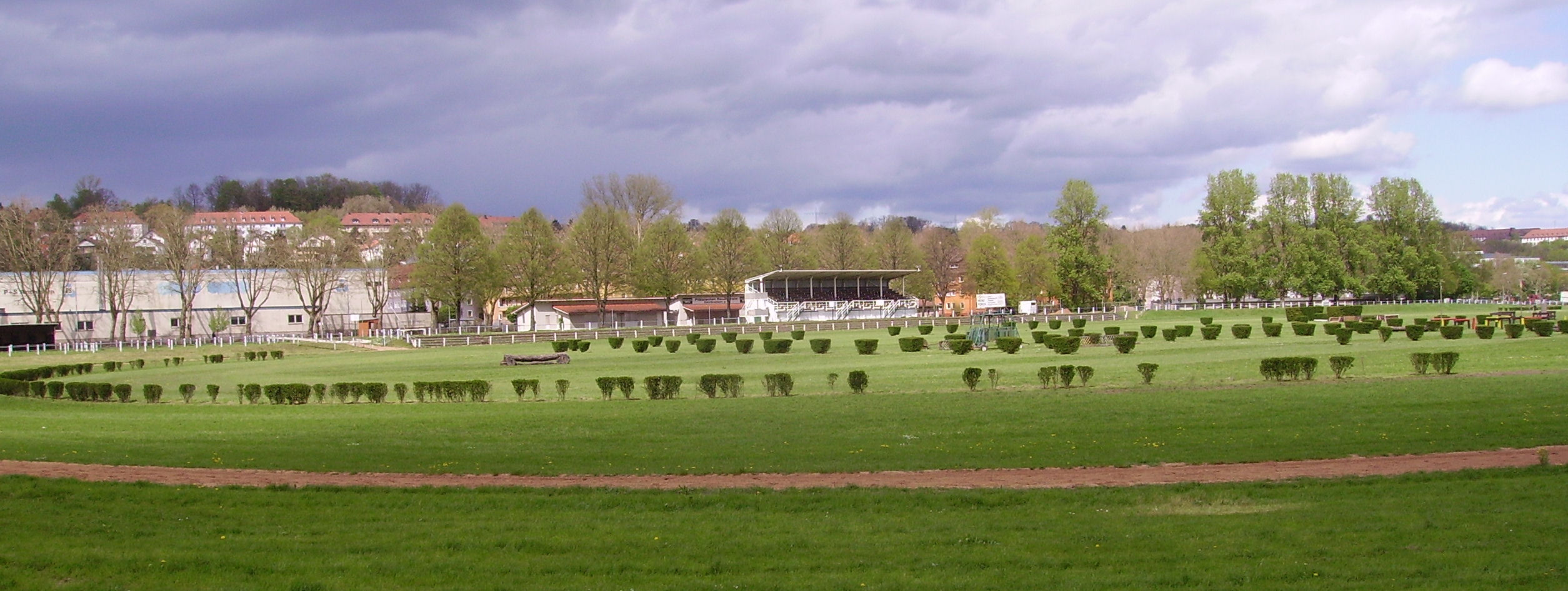 Pferderennbahn auf der Rennwiese in Zweibrücken, Germany